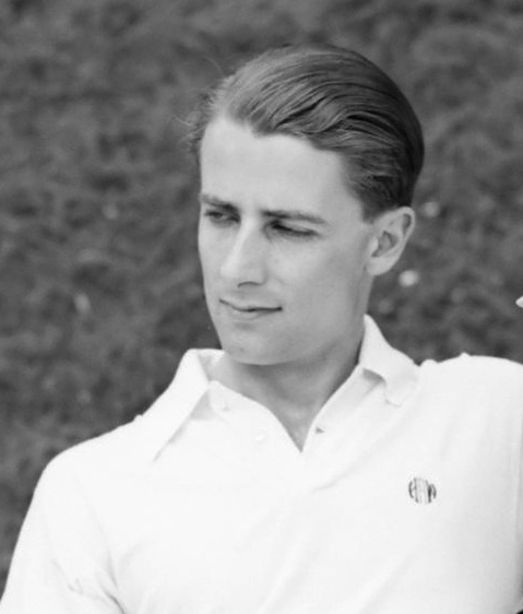 Tenniswedstrijd Frankrijk-Engeland op Roland Garros, Bunny Austin (Brits tennisspeler) met vrouw 1936